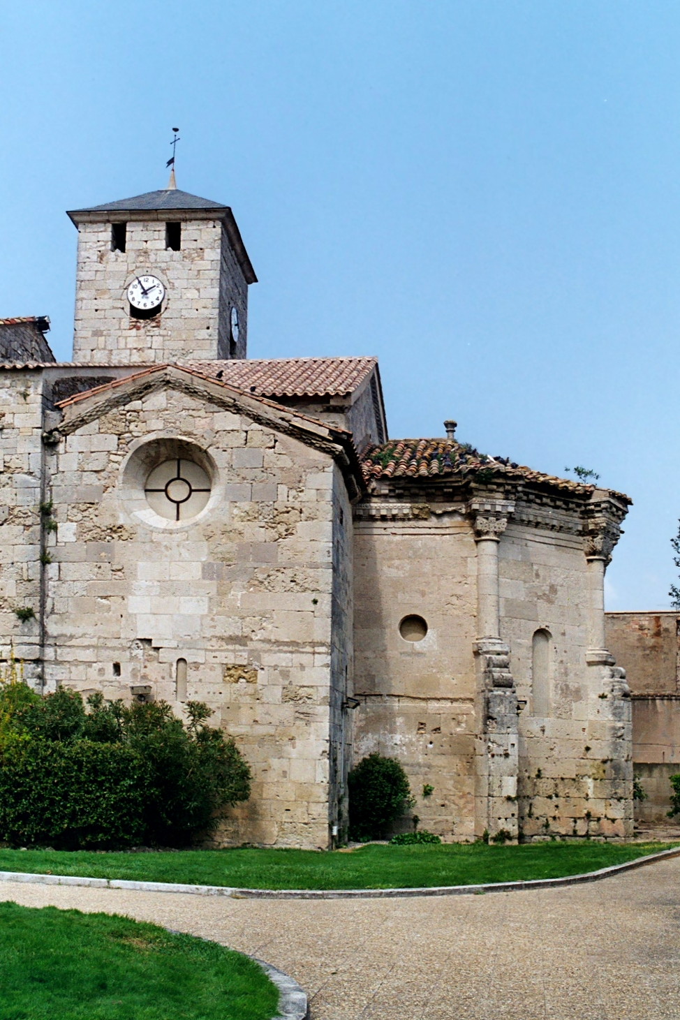 France - Languedoc - Hérault - Église Saint-Jacques de Béziers